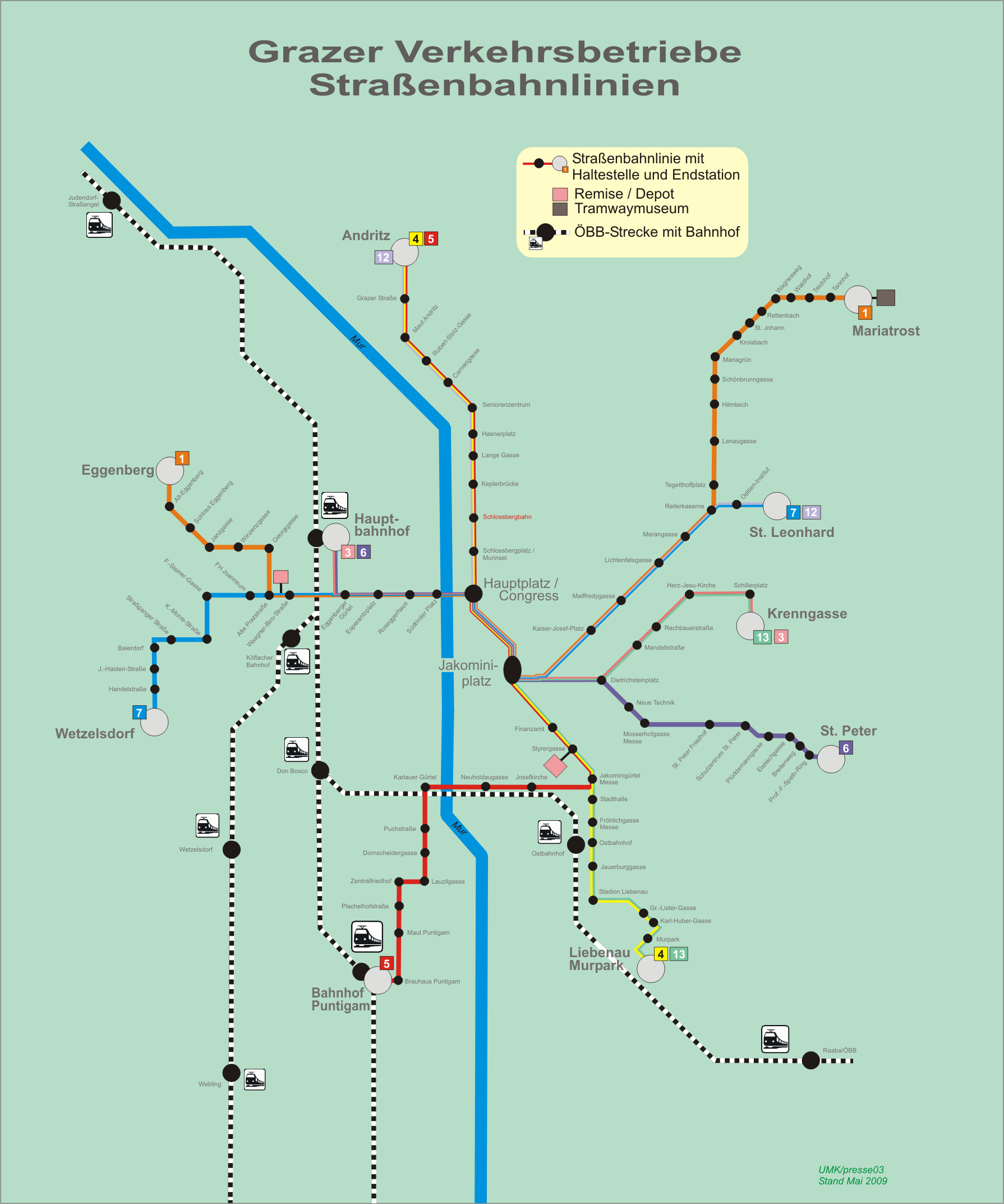 Grazer Verkehrsbetriebe GVB - Straßenbahn-Linienplan 2008